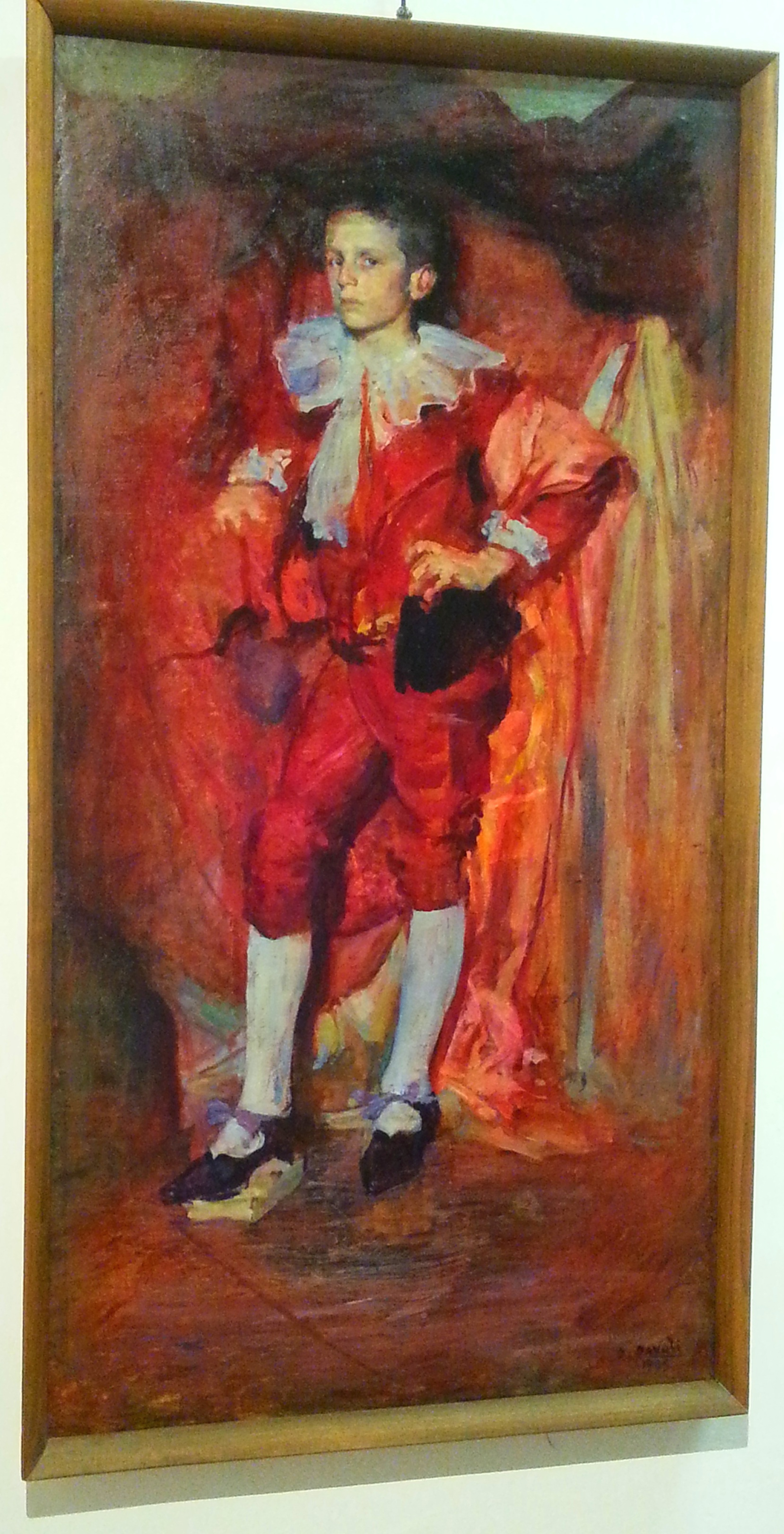 "il paggetto", fotografato nel 2015 in occasione della mostra ospitata dai Civici Musei di Reggio Emilia